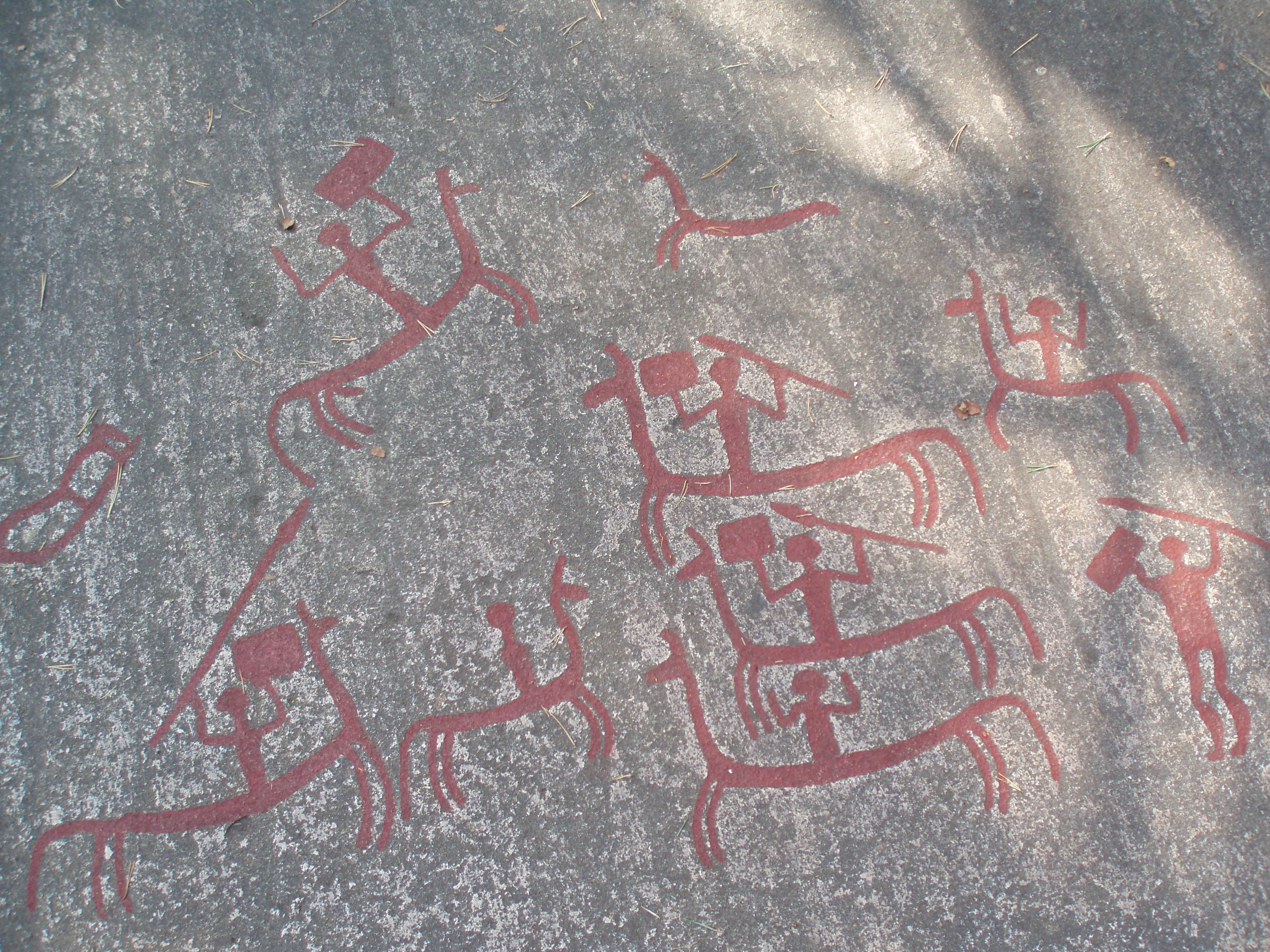 Bronzezeitliche Felsritzung in Tanum (Schweden), darstellend eine Reiterschlacht